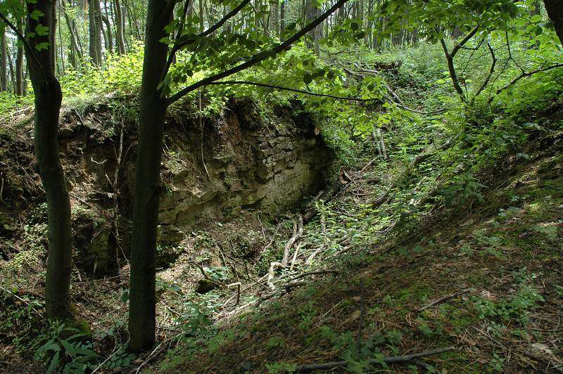 Čertova zeď - rýha po vytěžení čedičové žíly ohraničena pískovcovou stěnou